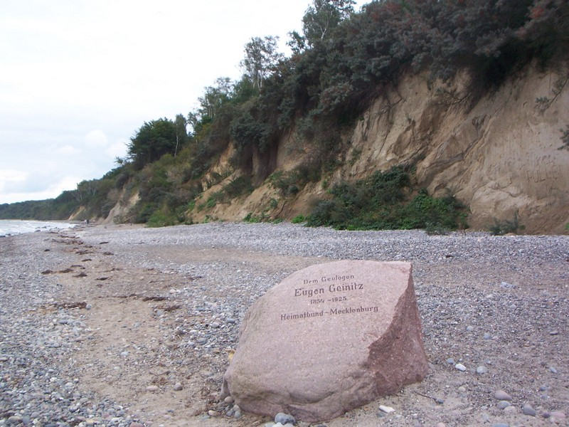 Steilküste Stoltera mit Geinitz-Stein